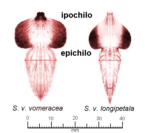 Morfologia del labello delle 2 sottospecie di Serapias vomeracea